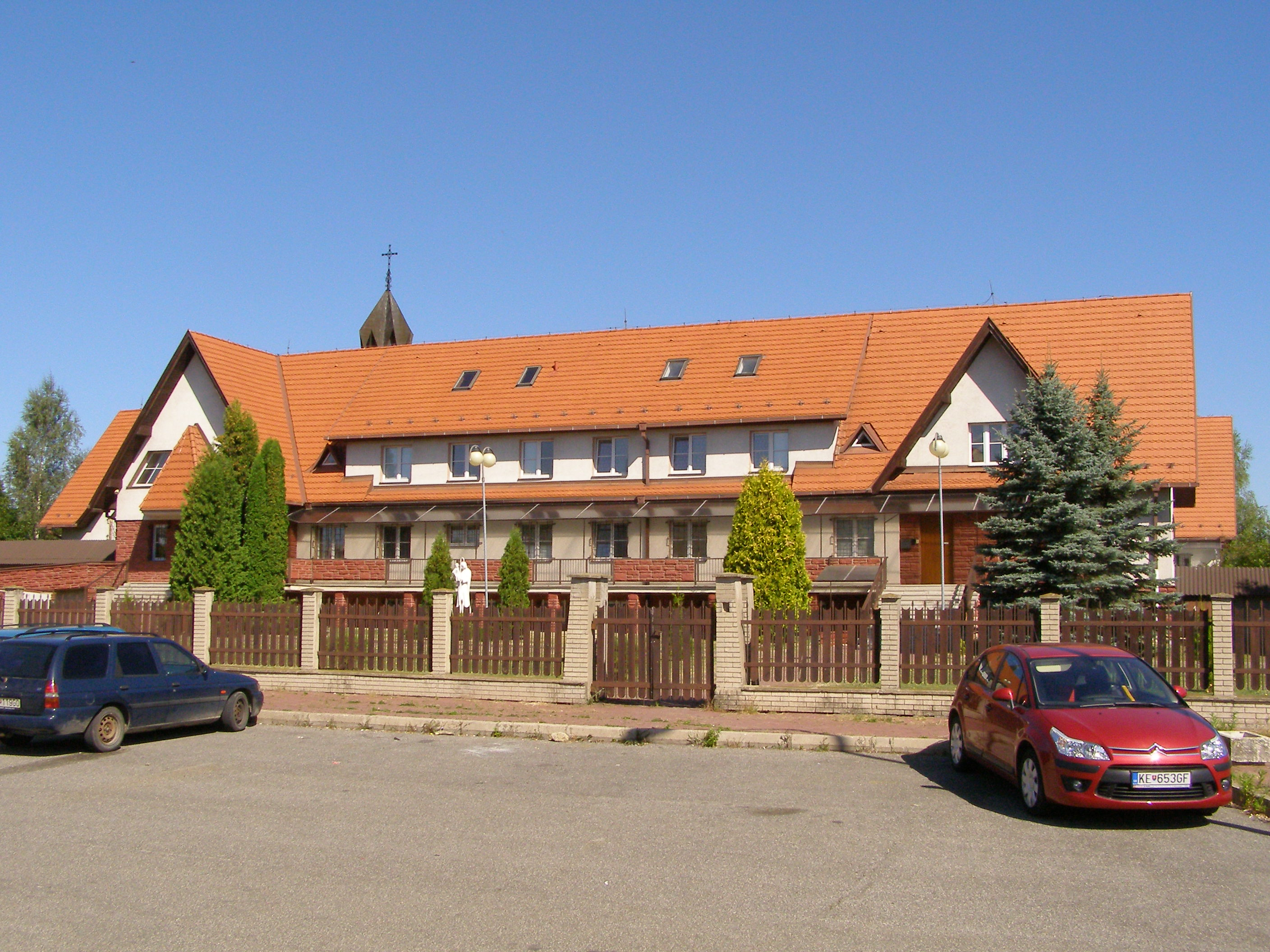 Kláštor